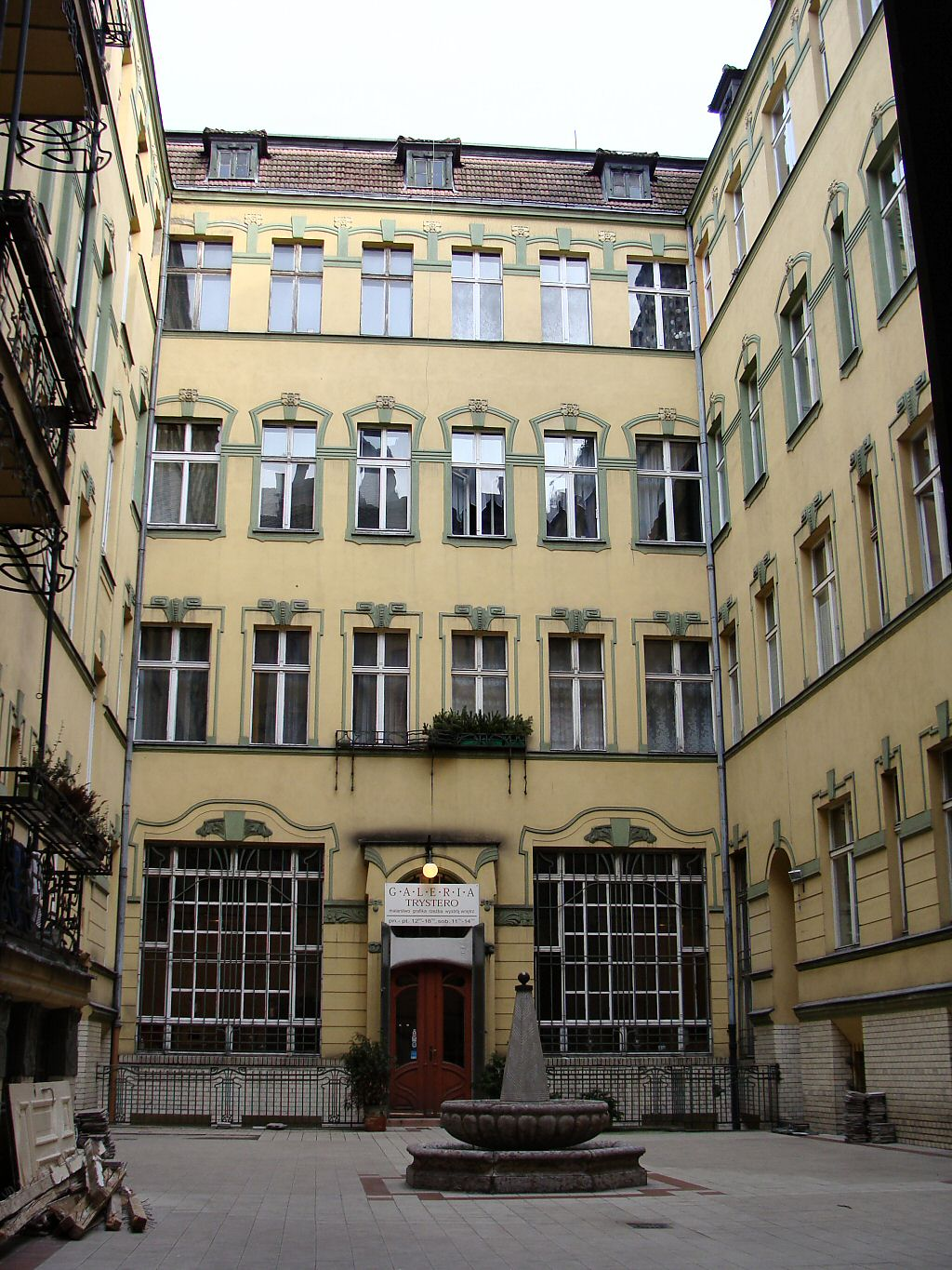 Kamienica przy ul. Św. Wojciecha 1 (oficyna), zabytek nr rejestr. 720